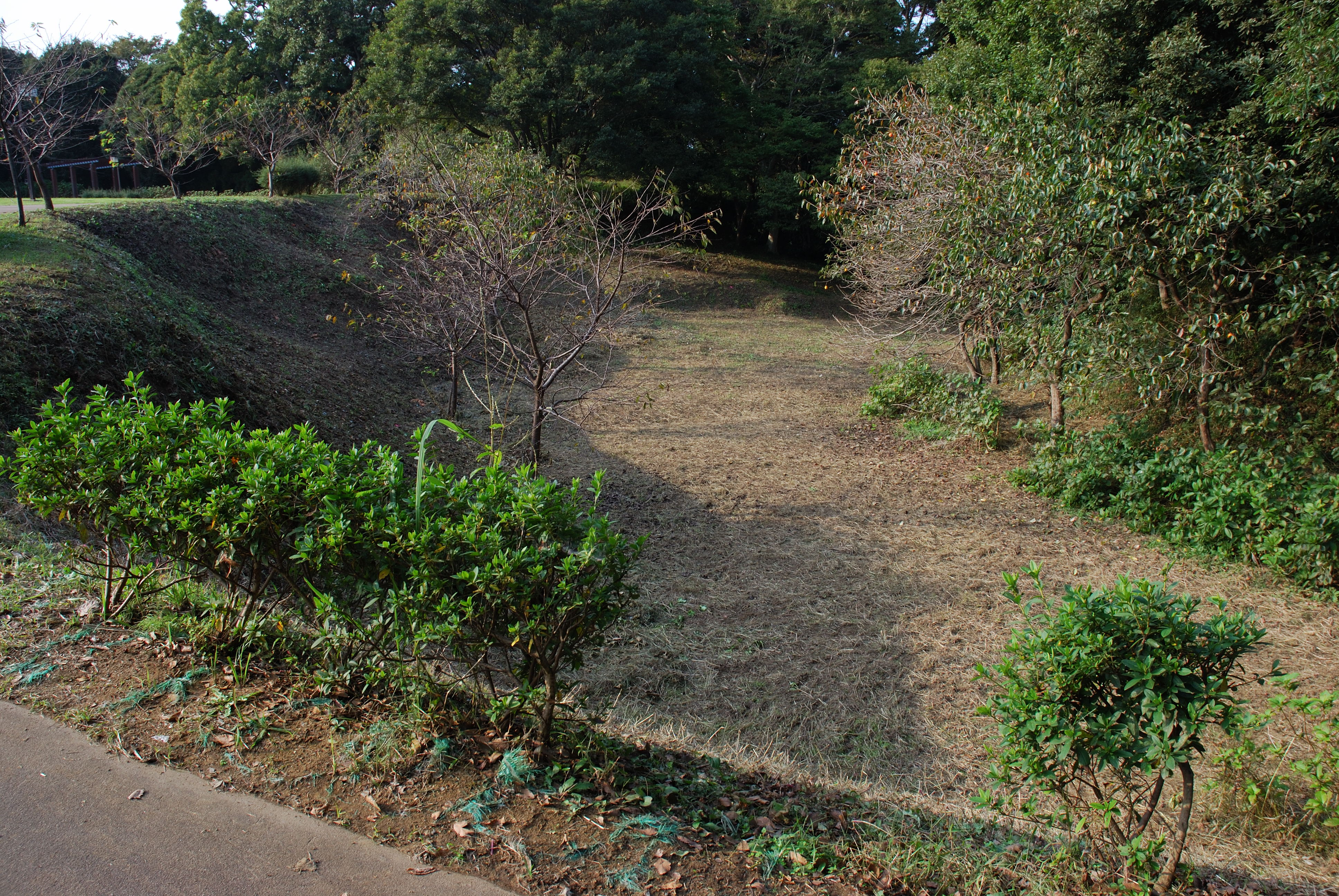 Usui Castle Hori